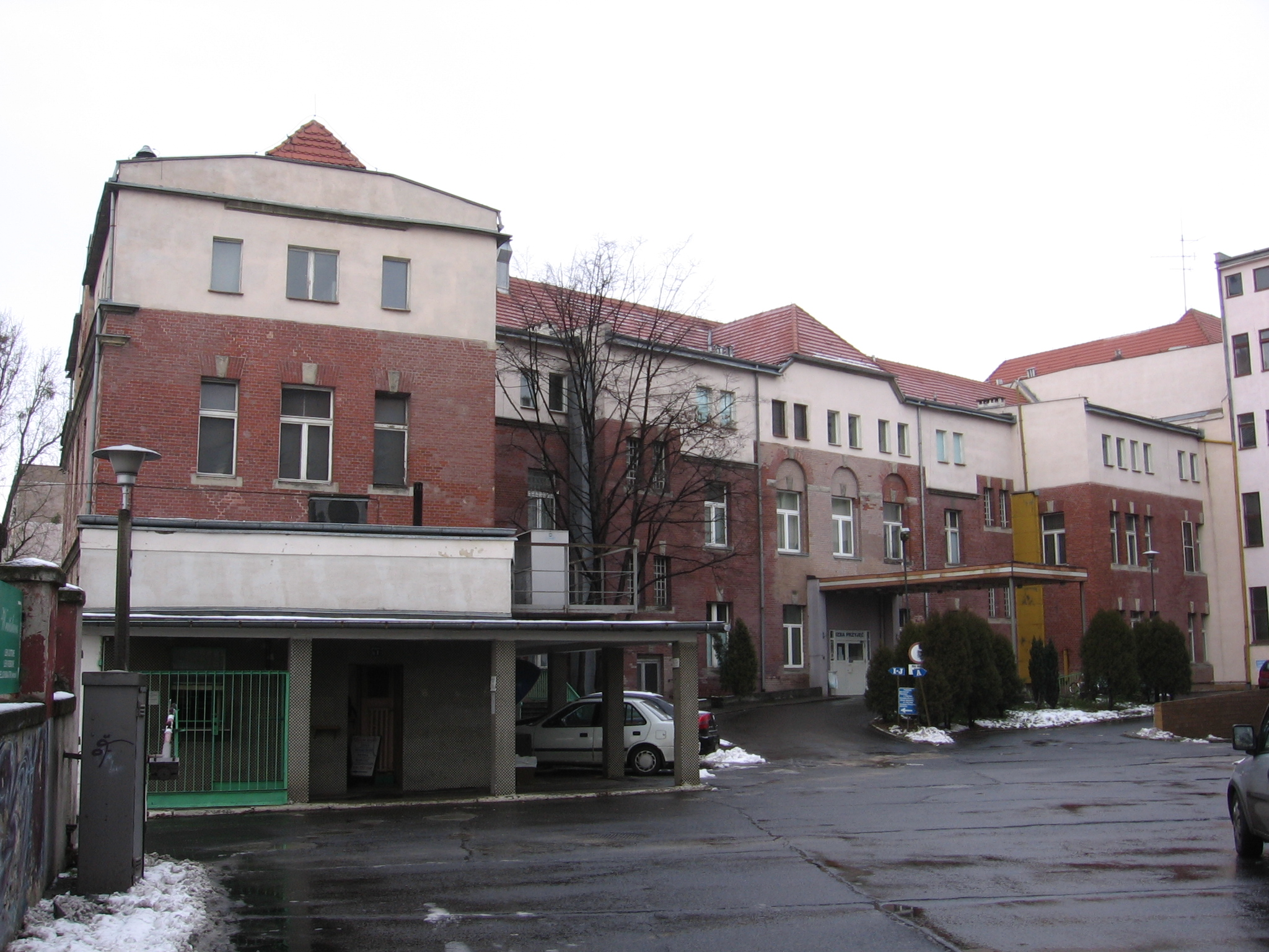 Szpital Kolejowy, ul. Wiśniowa, Wrocław